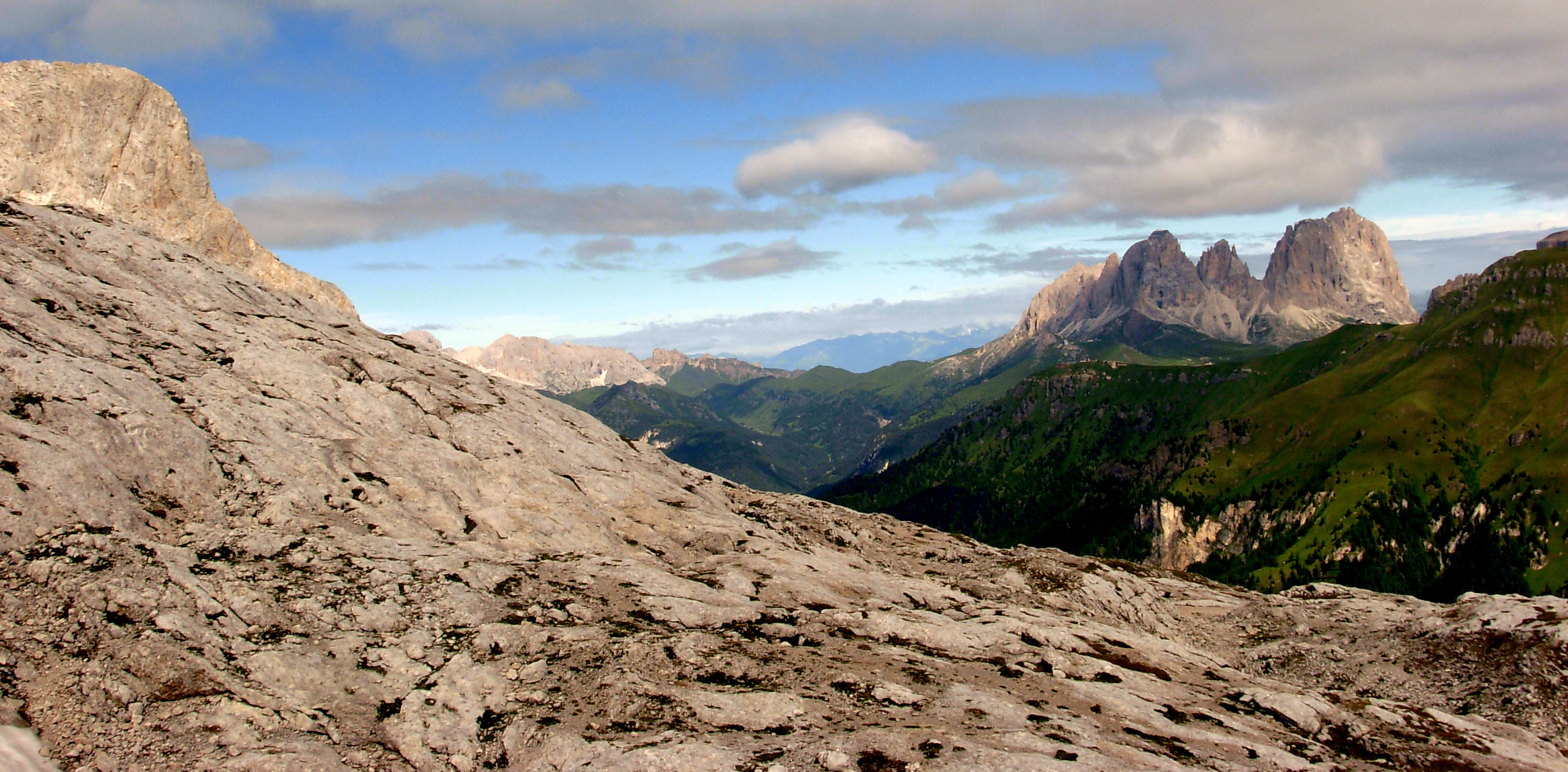 View to Langkofel group from Marmolada/Dolomitinių Alpių kylant į Marmoladą